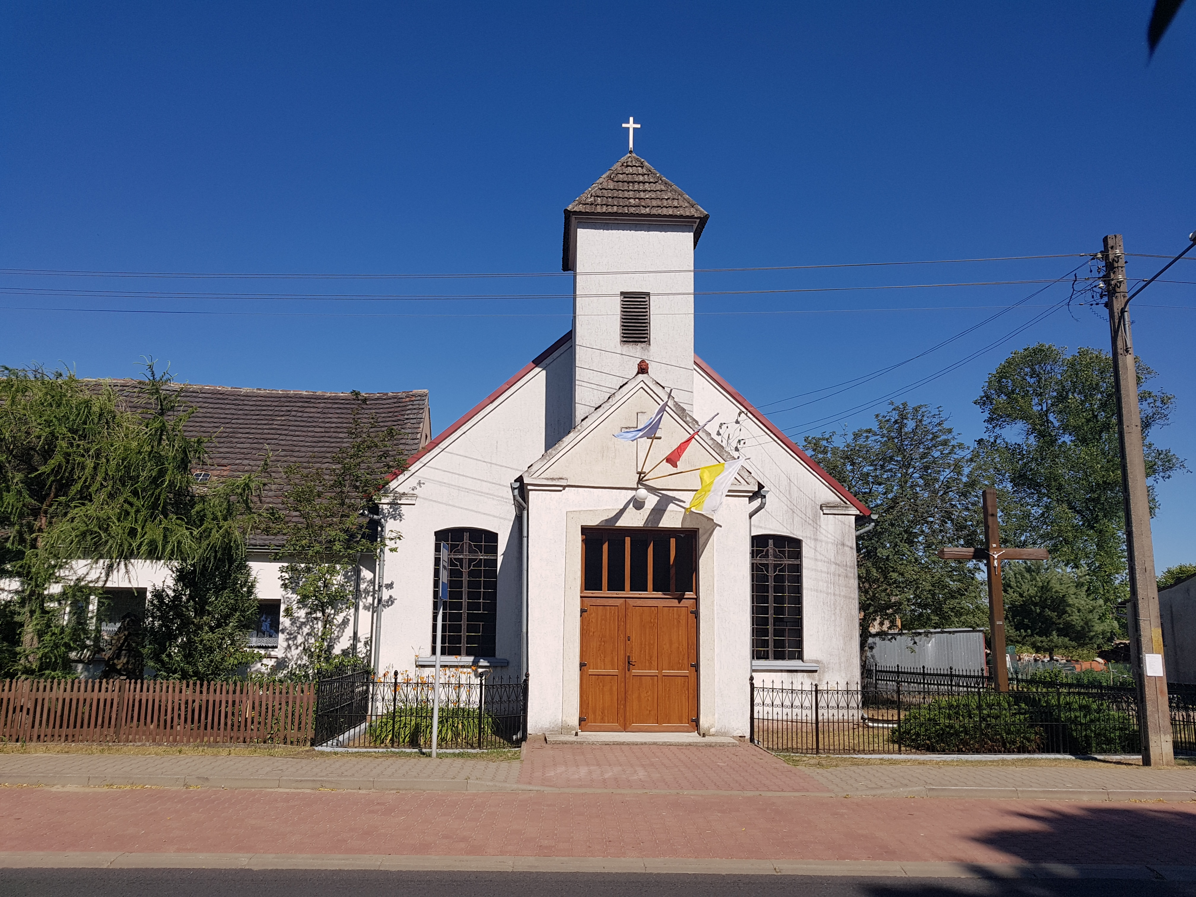 Kaplica pw. św. Marii Magdaleny należąca do rzymskokatolickiej parafii pw. Św. Wojciecha Bp Męczennika w Trzcielu